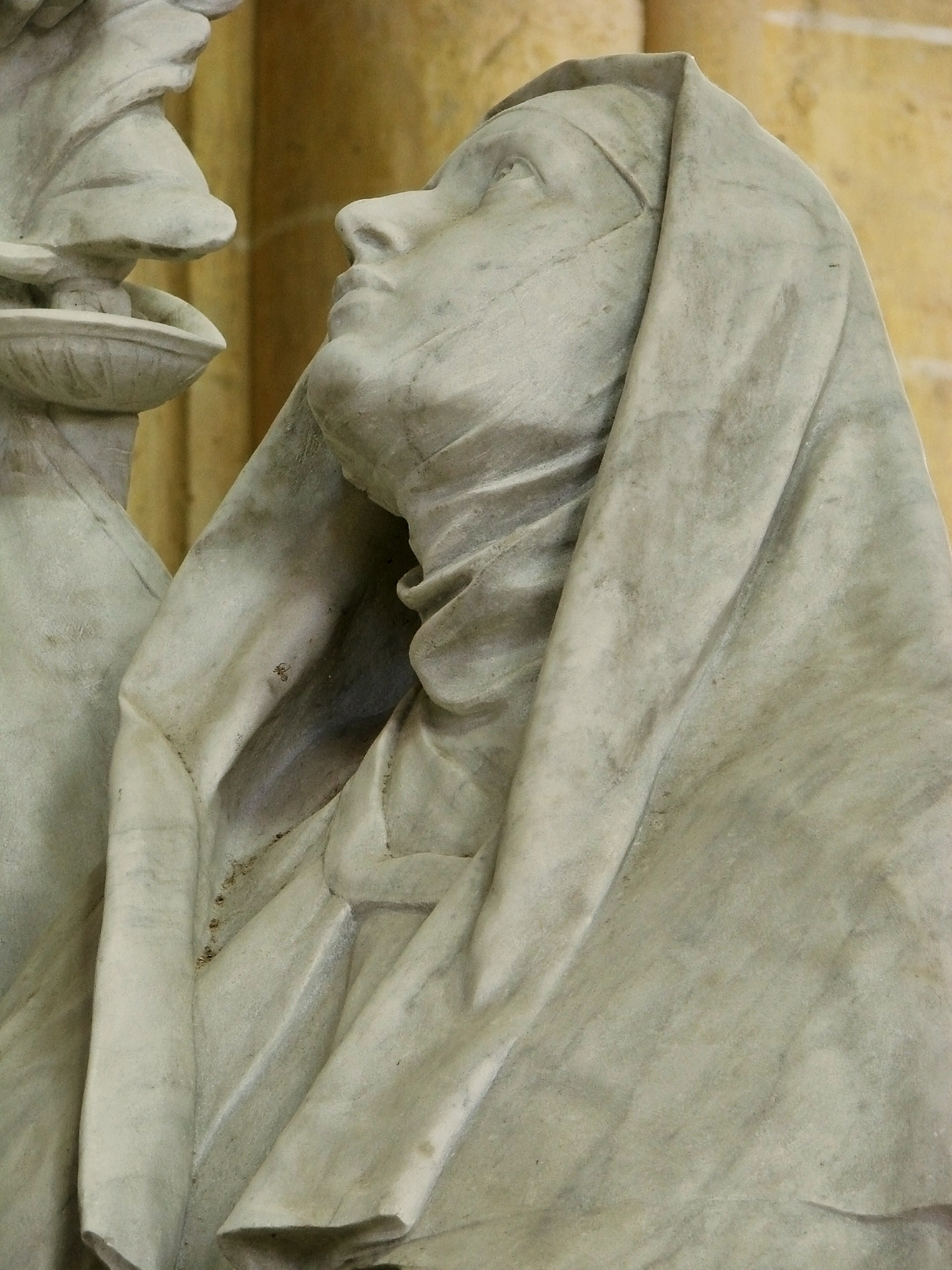 Le Grand Monument de Bossuet, oeuvre d'Ernest Henri Dubois (Dieppe 16/03/1863 - Paris 30/12/1930), placé dans la cathédrale de Meaux en 1911. Louise de La Vallière portant l'habit de carmélite.